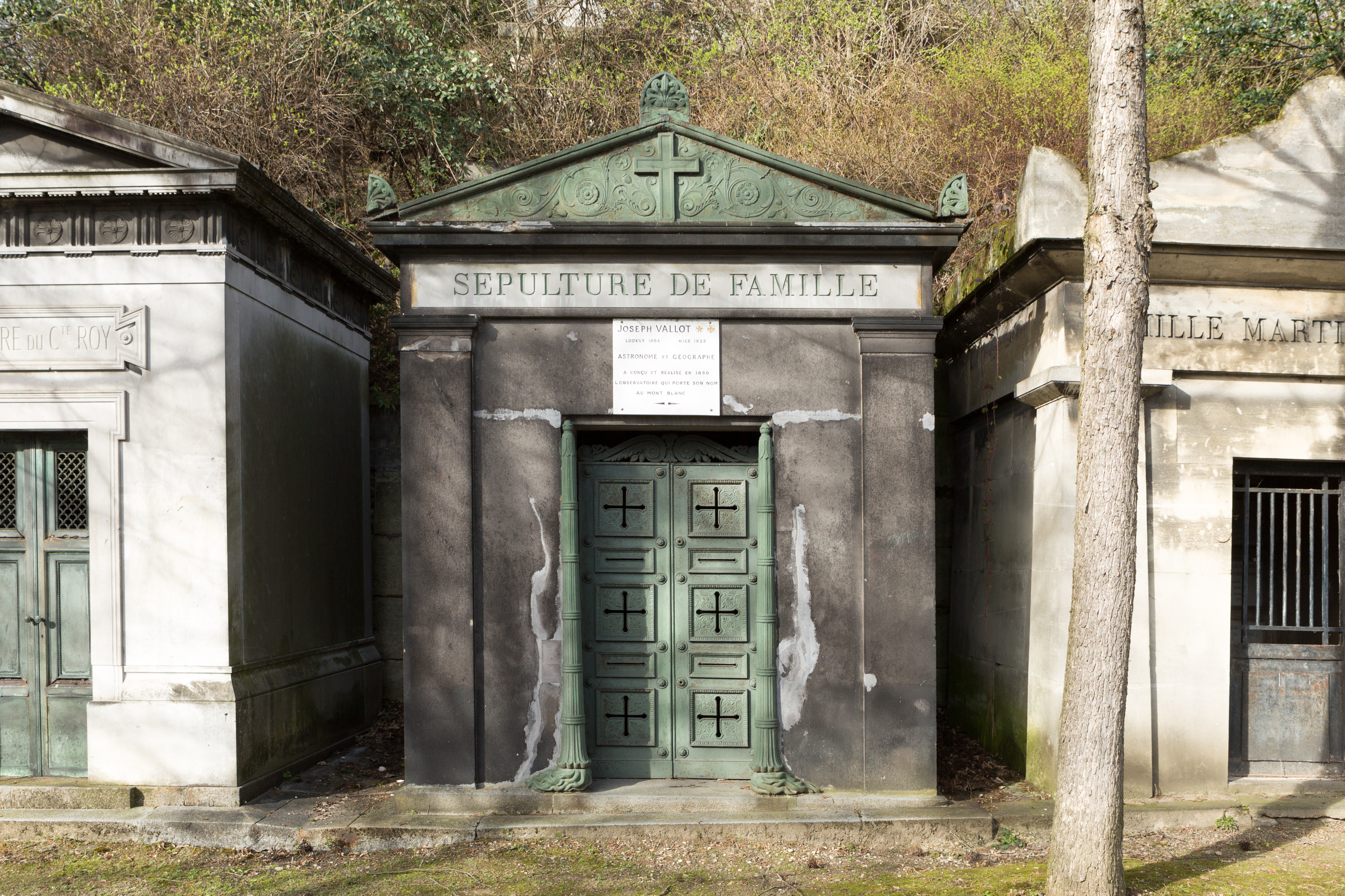 Sépulture de Joseph Vallot (1854-1925), astronome, géographe, naturaliste, alpiniste et mécène.